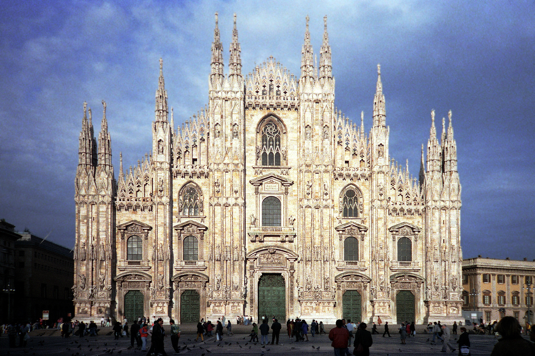 Milano, ItaliaMilano